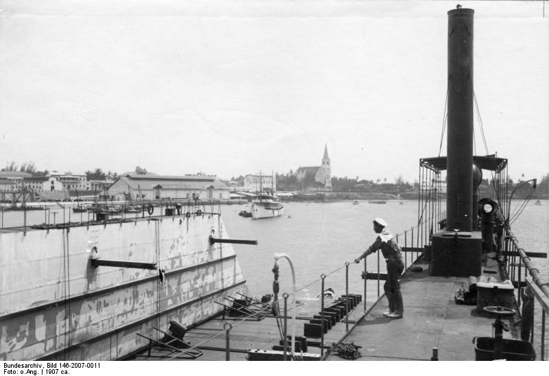 Exzellens Dernburg in Ostafrika Hafenbild aus Daressalam